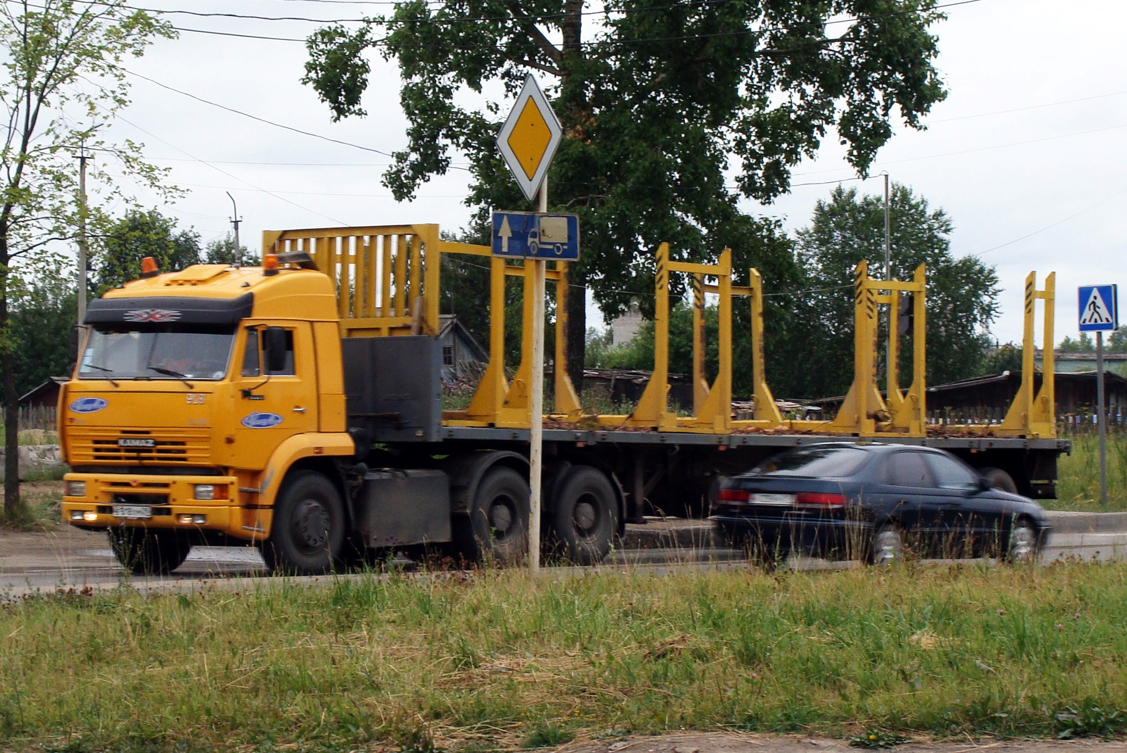 Лесовоз с желтыми проблесковыми маячками, Коряжма